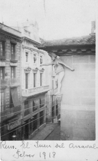 Imatge del jueu del raval el 1918, abans de la remodelació de la casa del raval de santa Anna de Reus